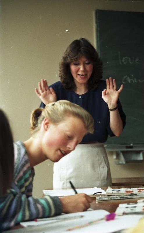 Juni 1988 Duisburg: Englischunterricht in einem Gymnasium.